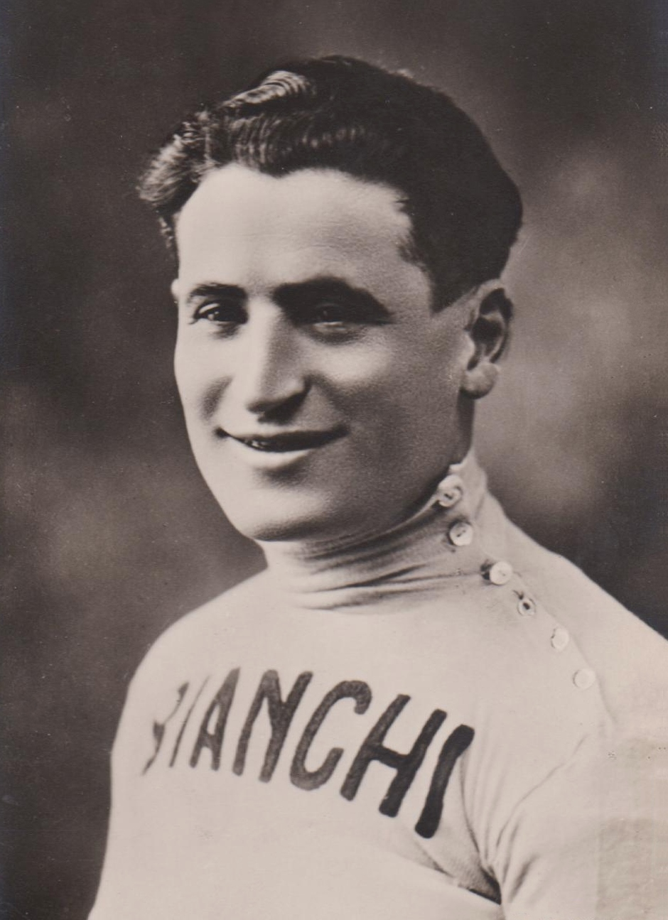 SPORT CICLISMO DOMENICO PIEMONTESI NOVARA 1932